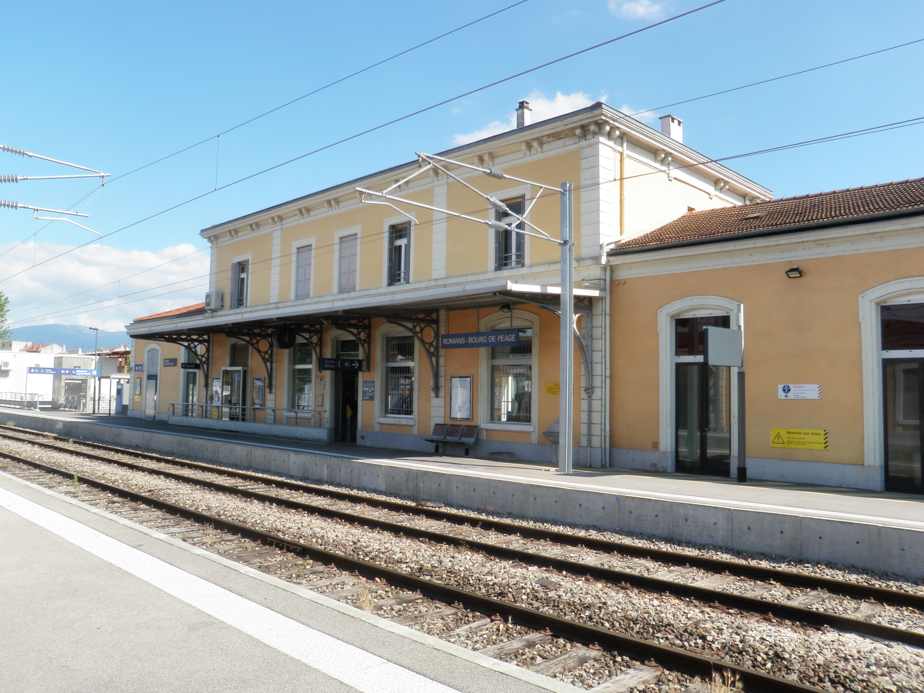 Vue de la Gare de Romans-Bourg-de-Péage depuis les quais. La ligne est en train d'être éléctrifier.